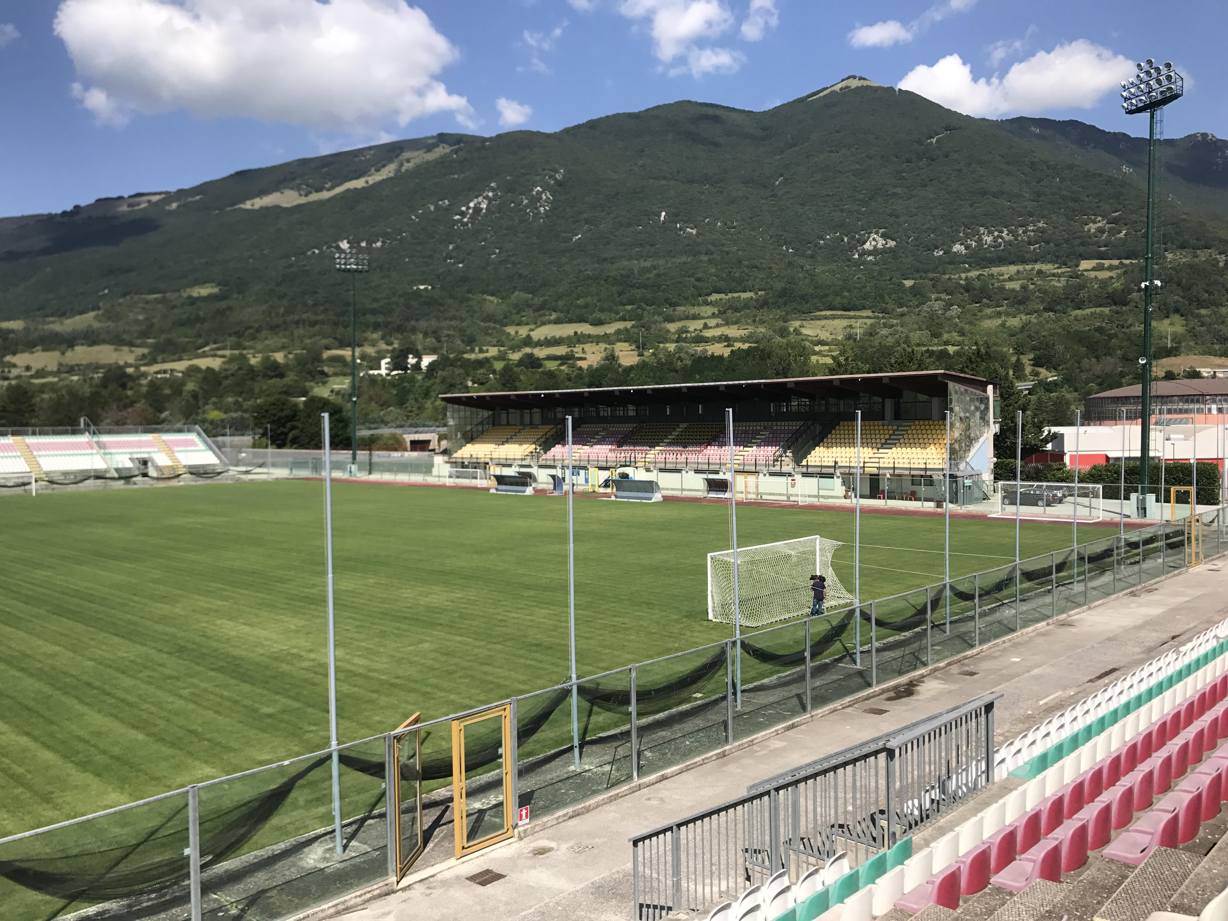 Vista dello stadio dal settore Curva Nord